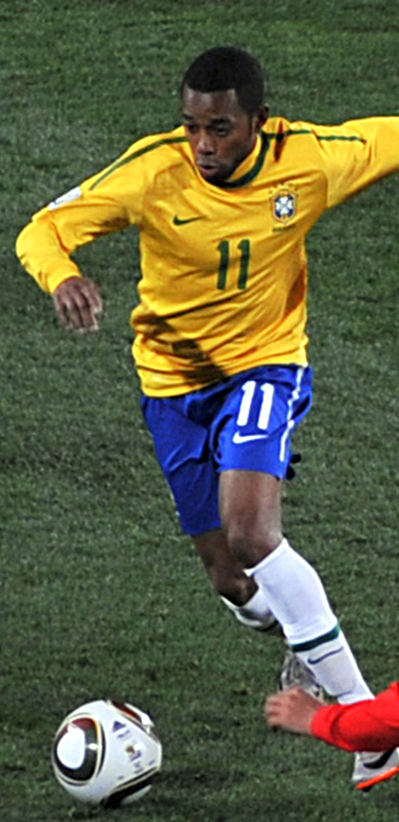 Seleção brasileira estreia na Copa do Mundo de 2010 contra a Coreia do Norte.